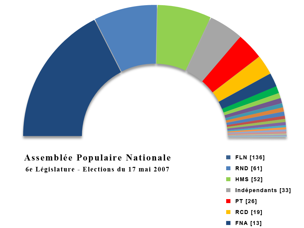 Assemblée Populaire Nationale, 6e législature, 2007-2012